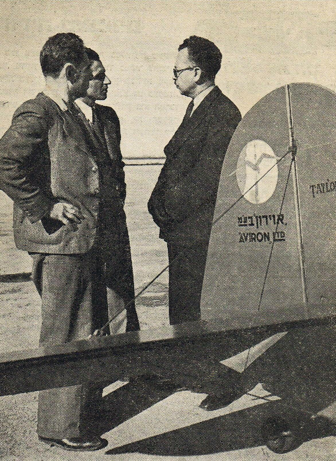 דב הוז ויצחק בן יעקב משוחחים עם הטייס הראשי של חברת "אוירון".